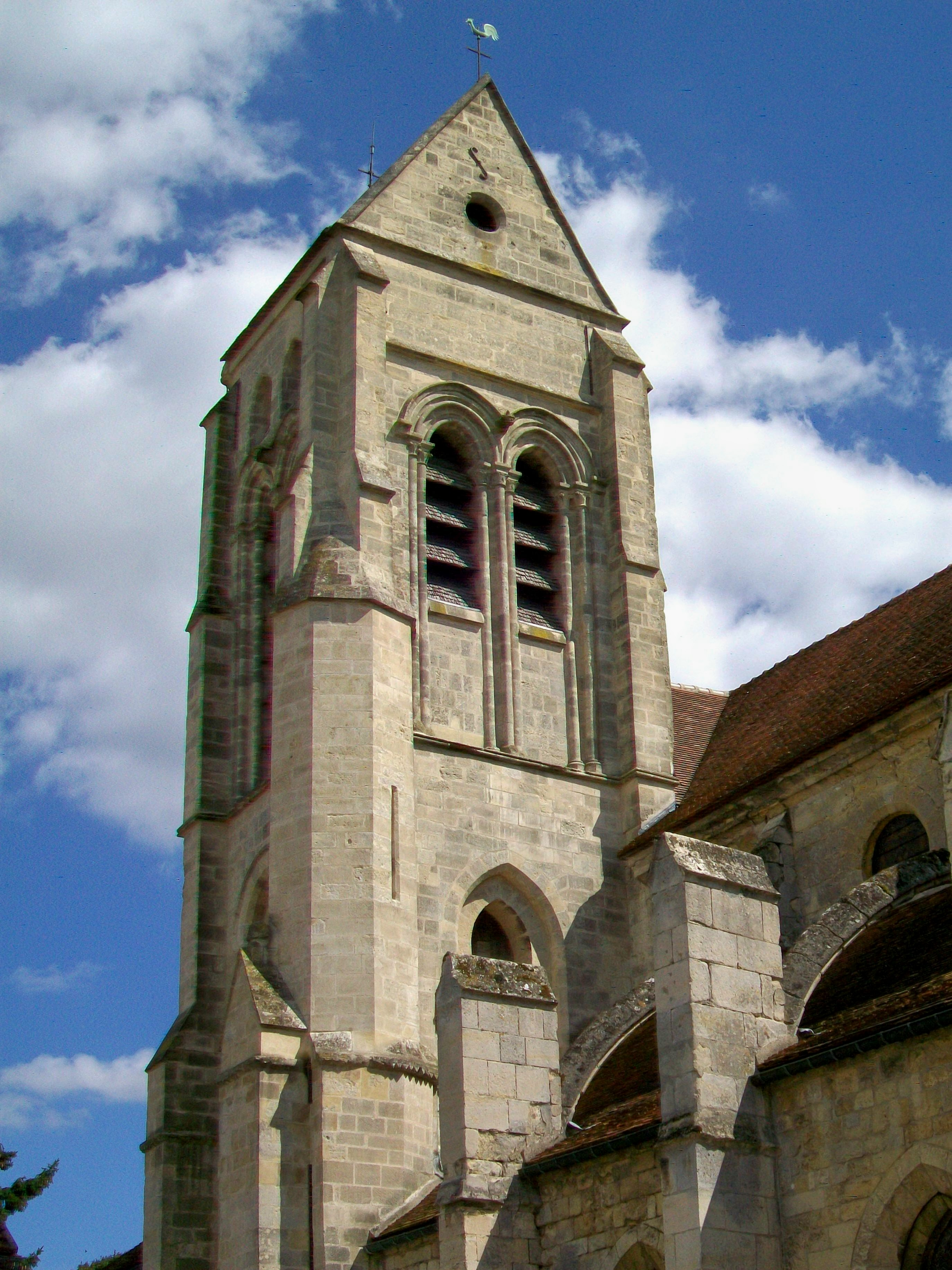 Le clocher de l'église Saint-Étienne.